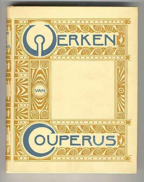 Band ontworpen door Berlage. Boekomslag. voor de serie uitgaven van werk van Louis Couperus. Bandontwerp: H.P. Berlage (serieband ‘Werken’). Uitgeverij: L.J. Veen.